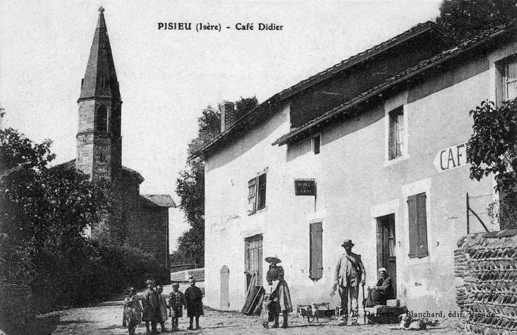 Pisieu (Isère) : Café Didier et l'église.